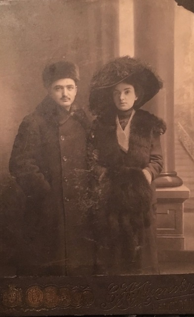 Роза Лазаревна Либерман с братом